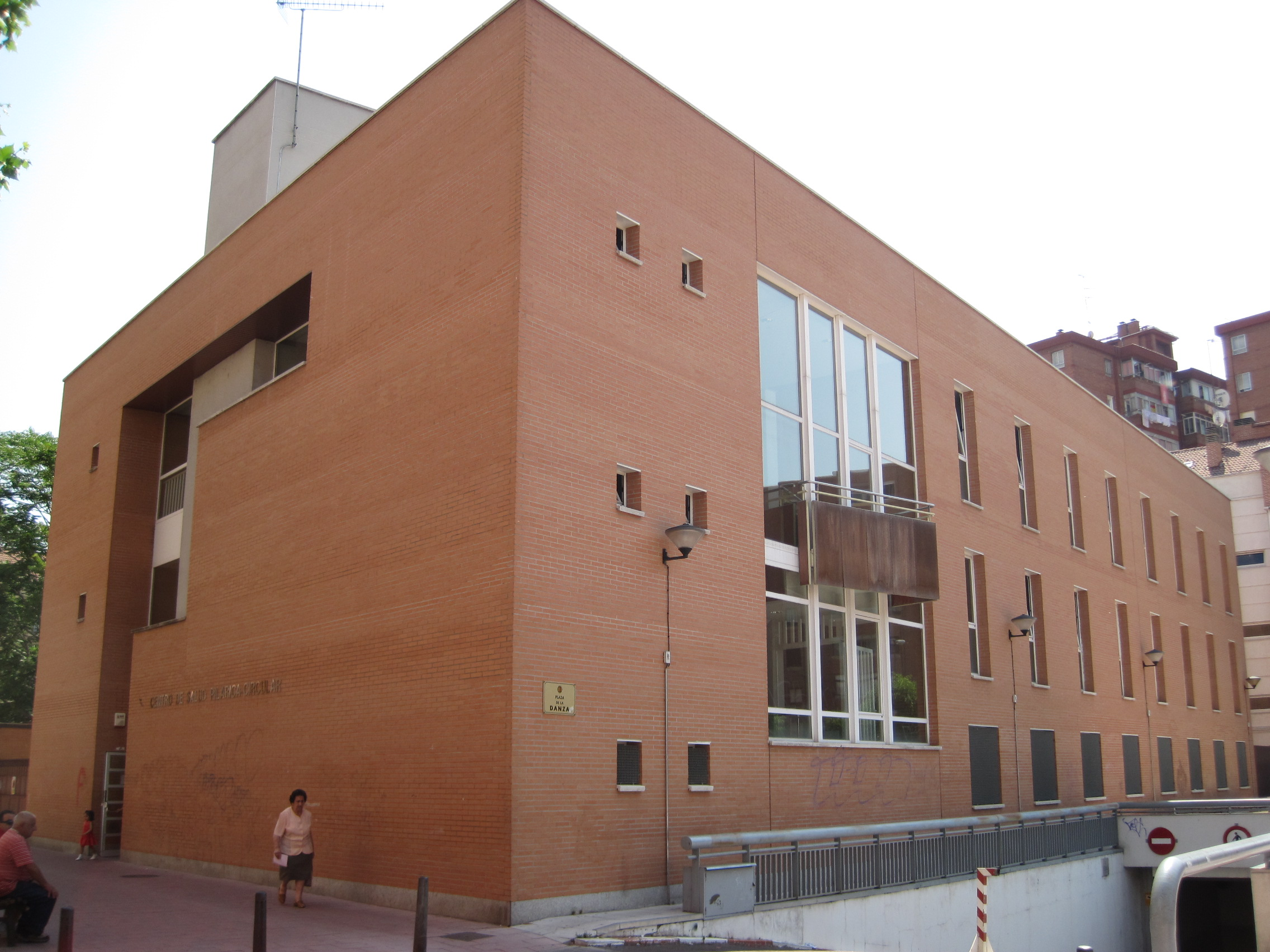 Centro de salud Plaza Circular, en Valladolid (España).